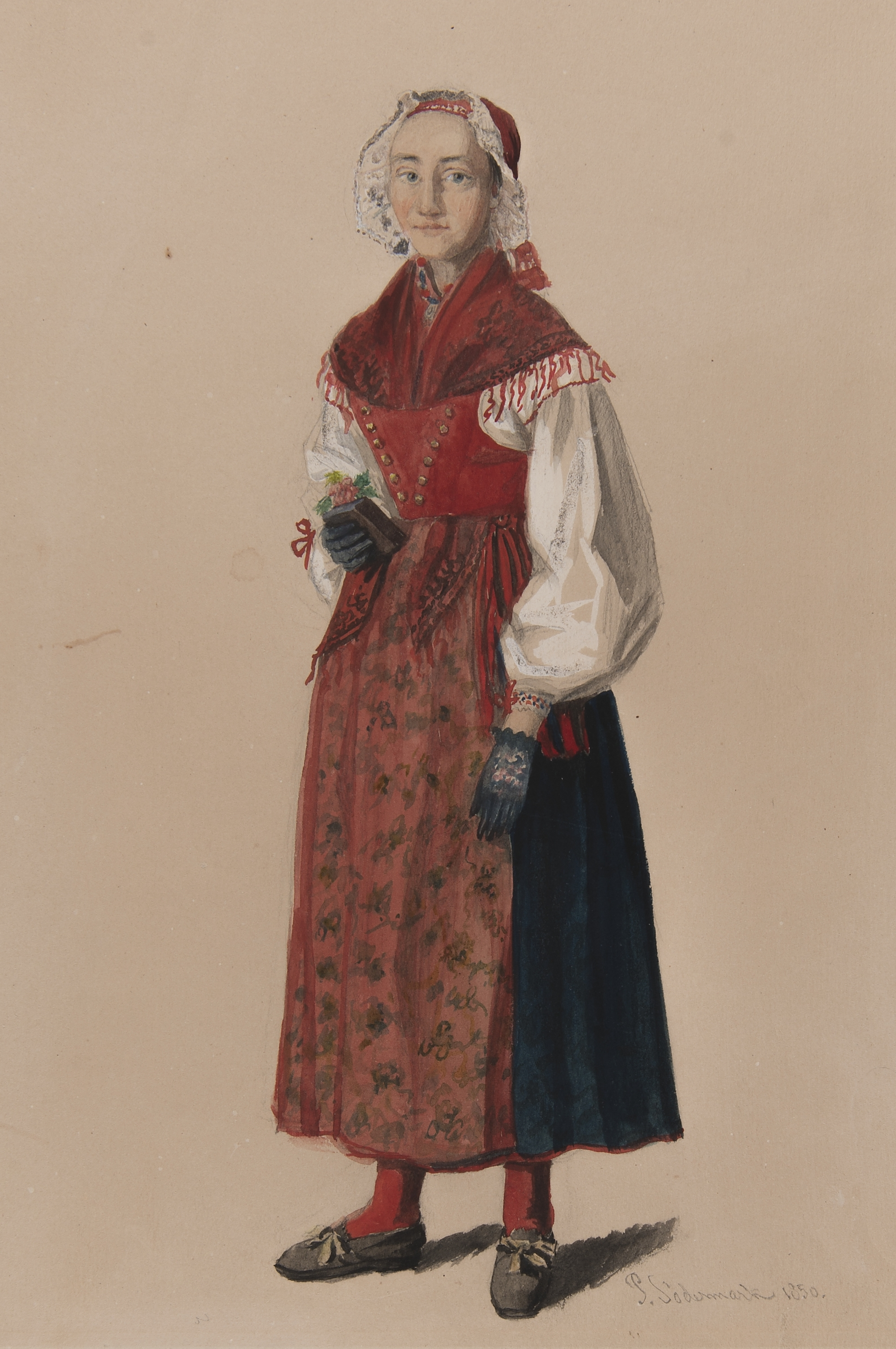 Kvinna i dräkt . Akvarell av P.Södermark. Depicted place: Q10725987 (Q10725987)